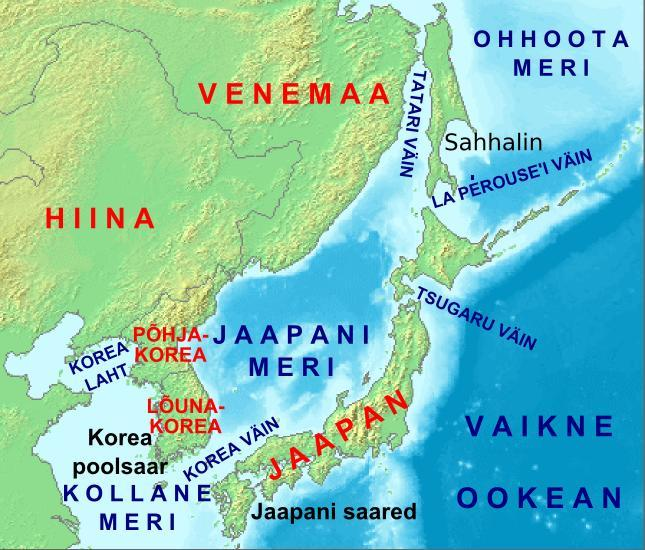 Kaart on tehtud DEMIS Mapserveri kaardi alusel ja pärast oli lisatud kohanimed.